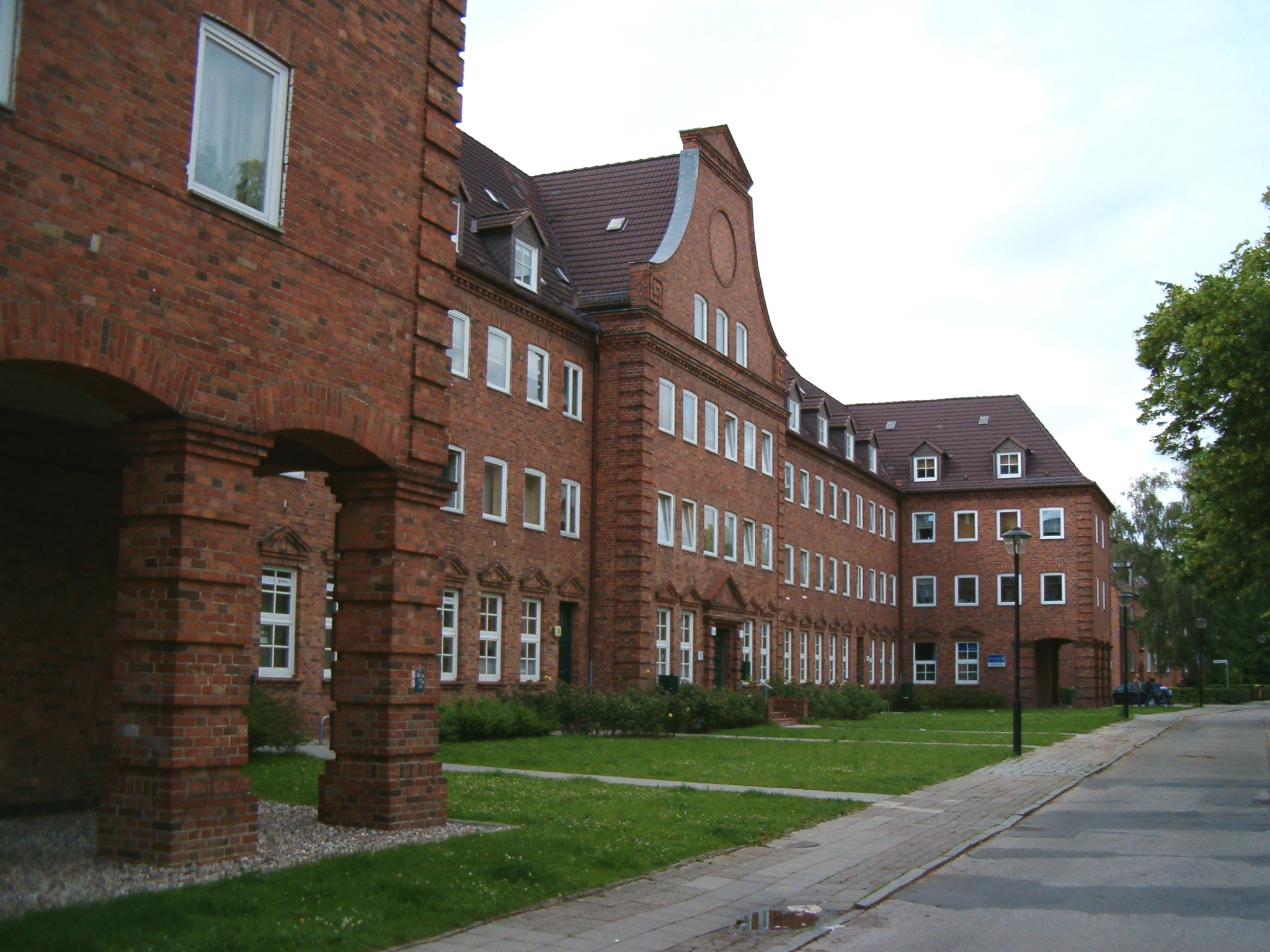 Wohnbebauung am Wiener Platz in Rostock-Reutershagen (Denkmalbereich)